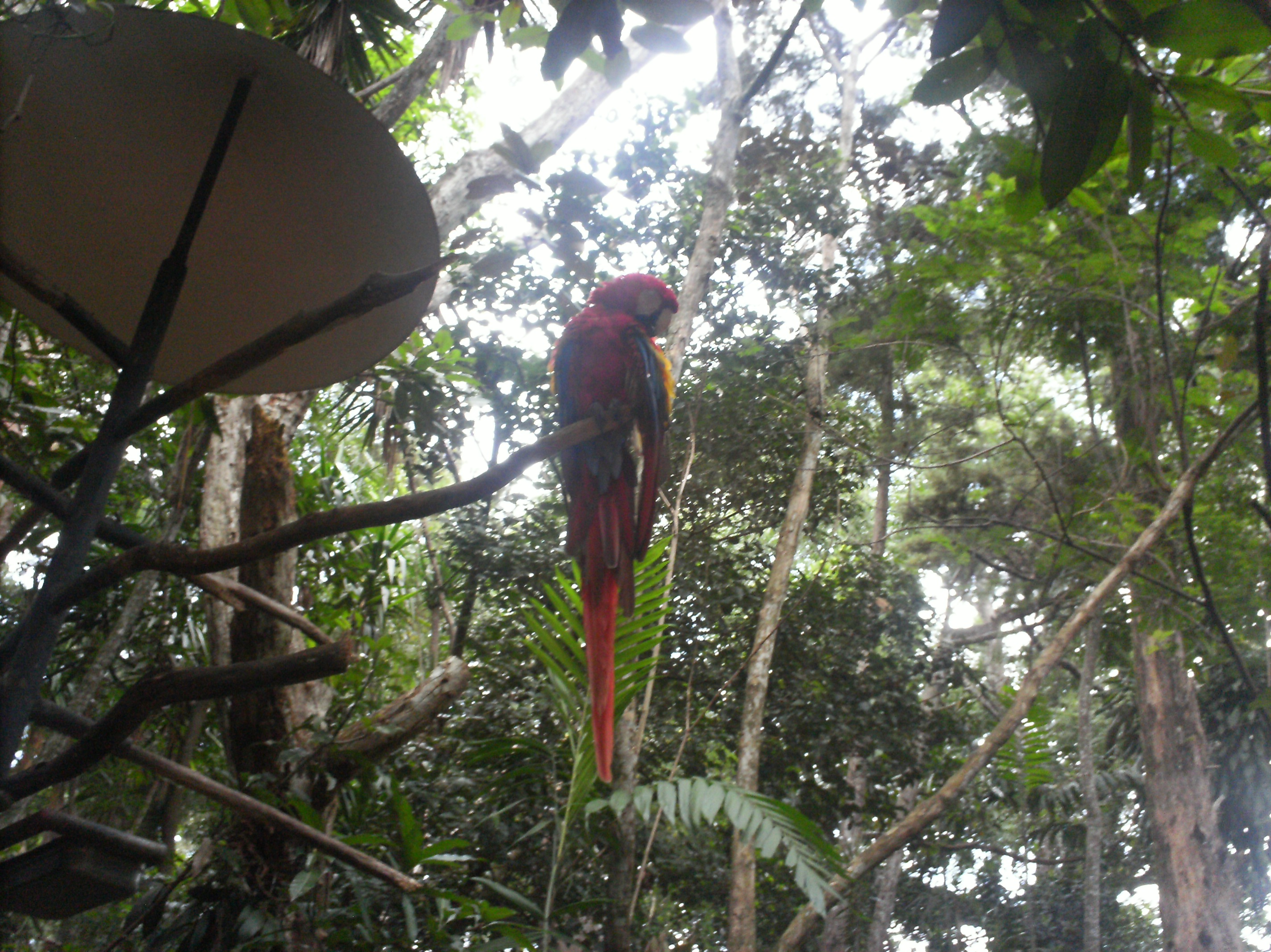 Un guacamayo macao en su entorno del Zoo Ave, Alajuela, Costa Rica